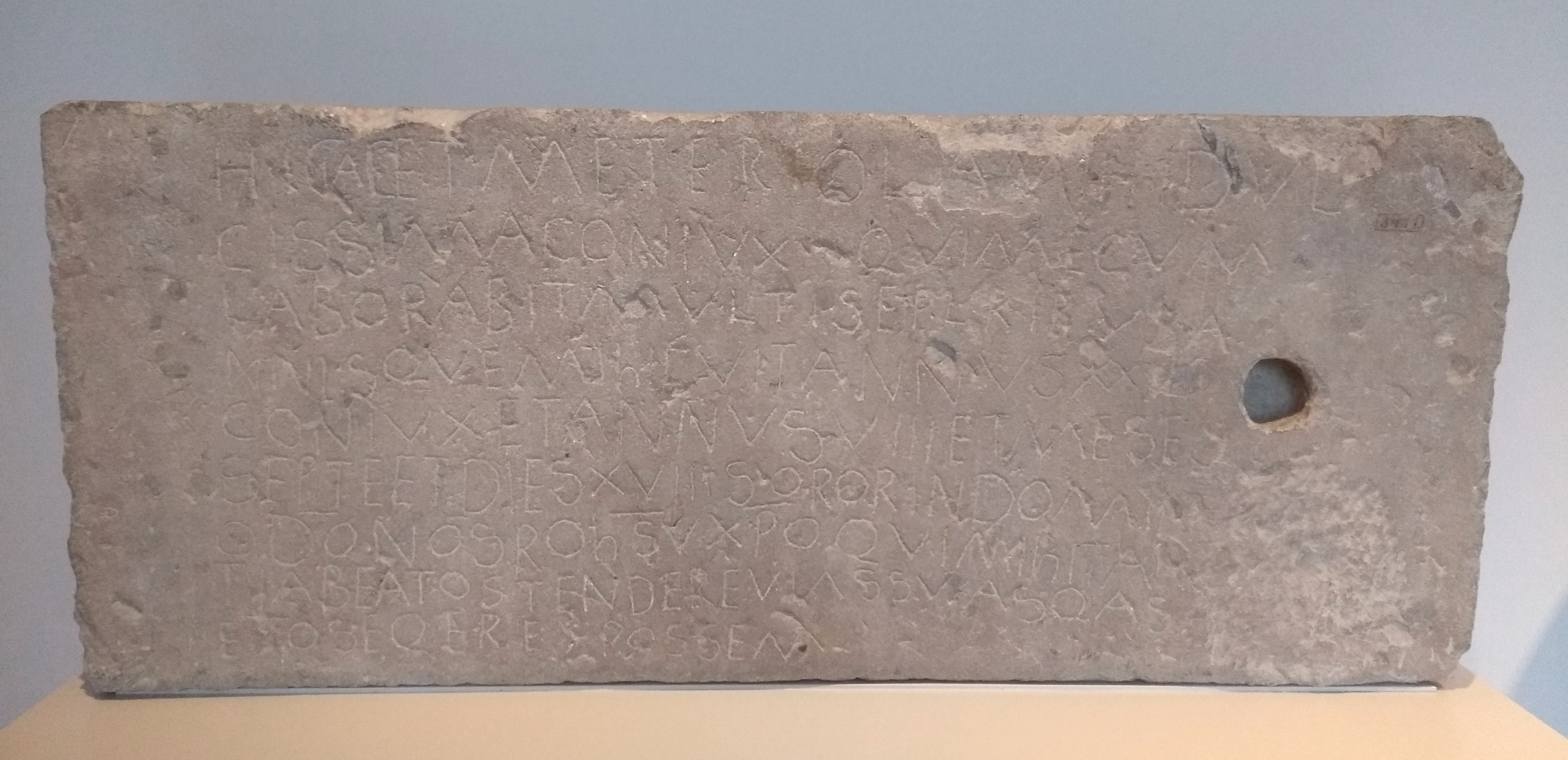 Grabstein der Meteriola, 5. Jahrhundert n. Chr. (CIL XIII,7813), gefunden in Remagen (Kreis Ahrweiler), heute im rheinischen Landesmuseum Bonn